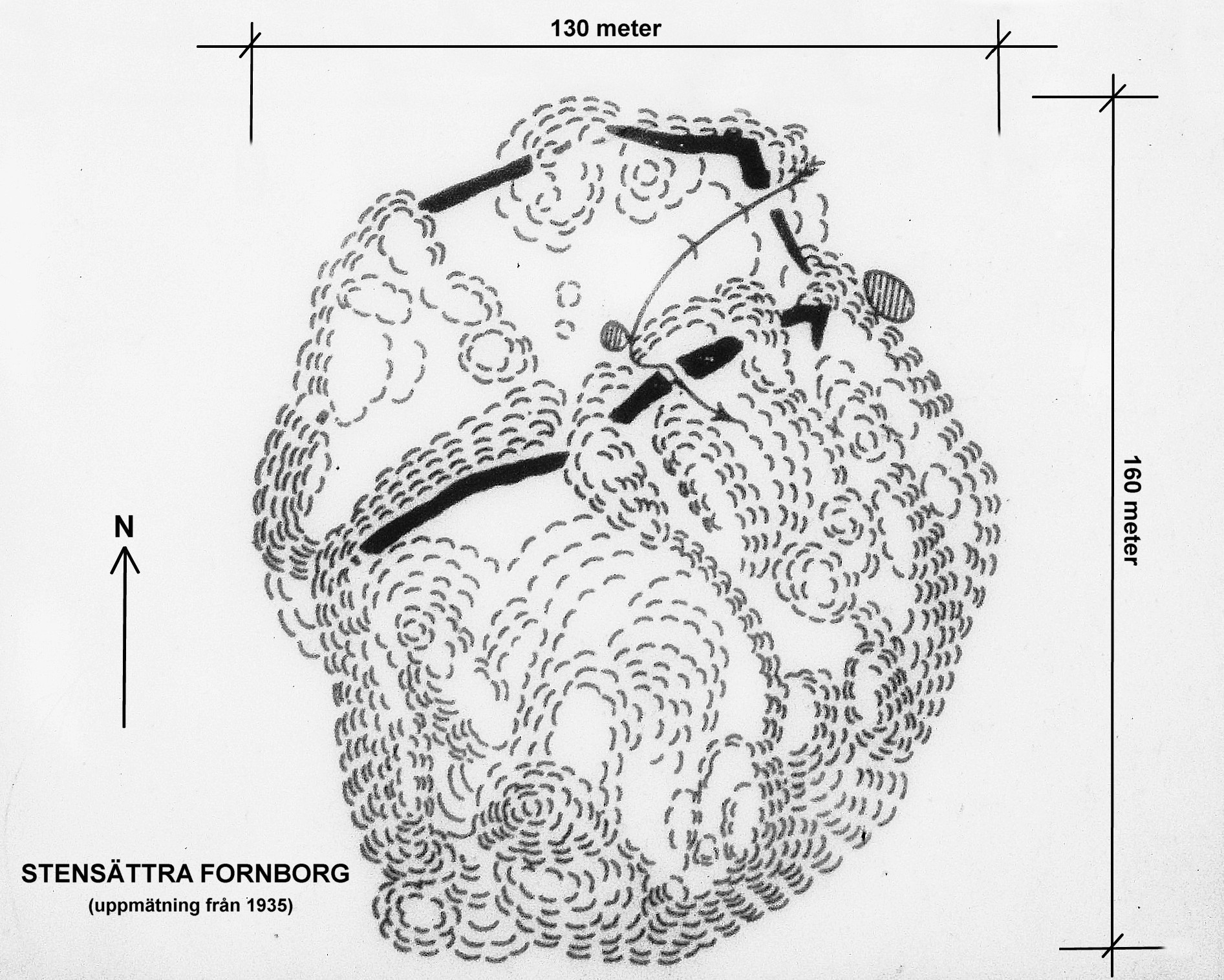 Stensättra fornborg, uppmätning från 1935. Ungefärliga huvudmått och norrpilen inlagda i efterhand av User:Holger.Ellgaard.